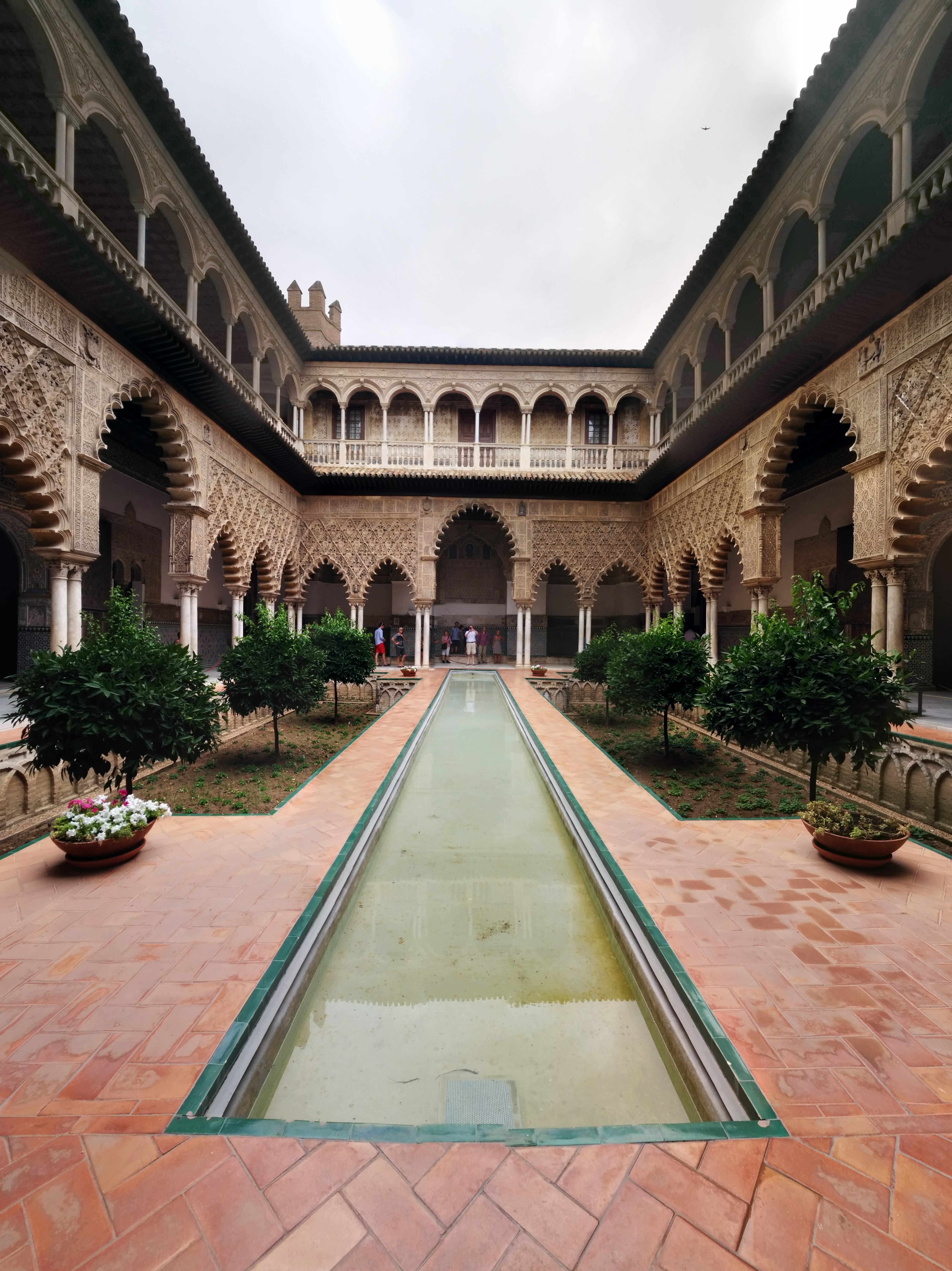 Día nublado en Los Reales Alcáceres, Sevilla